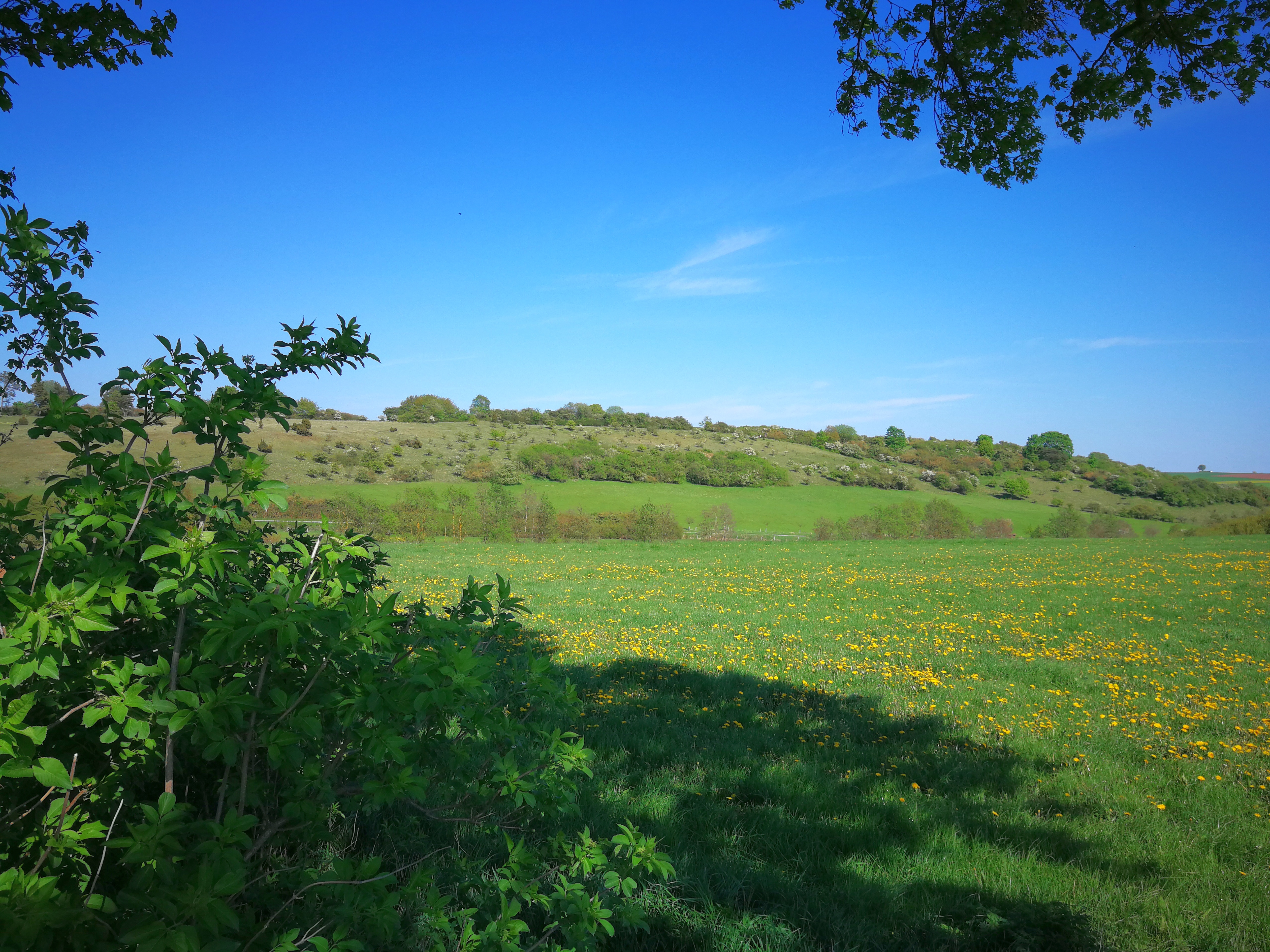 FFH-Gebiet Magerrasen bei Korbach und Dorfitter 51.247121°, 8.87307°